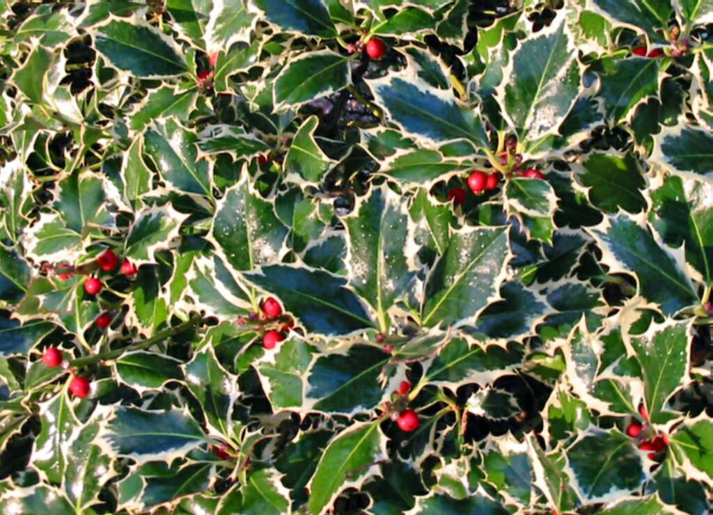 Houx panaché (Ilex aquifolium) Photo JH Mora, décembre 2005